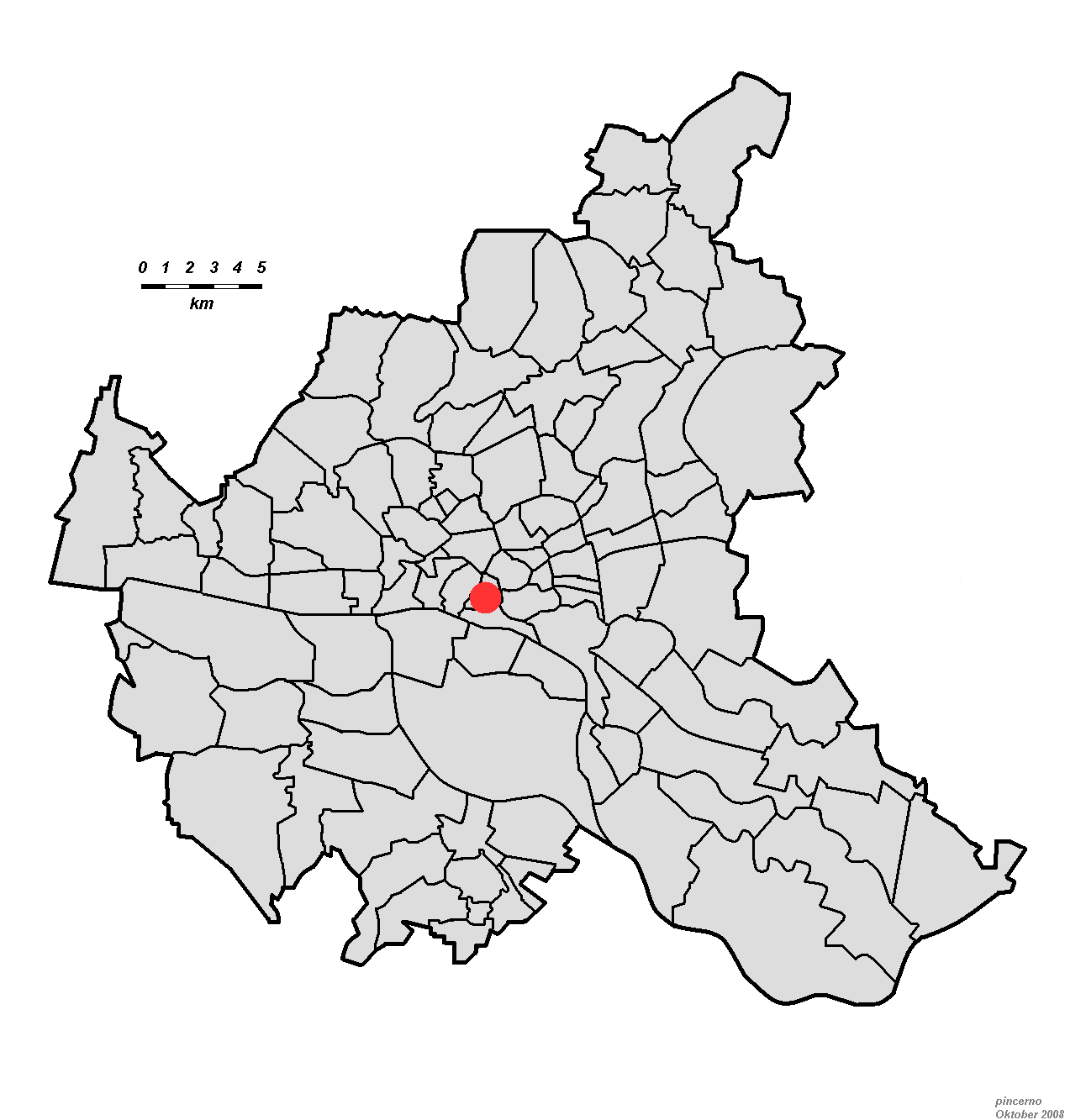 Lage des 1805 abgebrochenen Mariendoms in Hamburg.